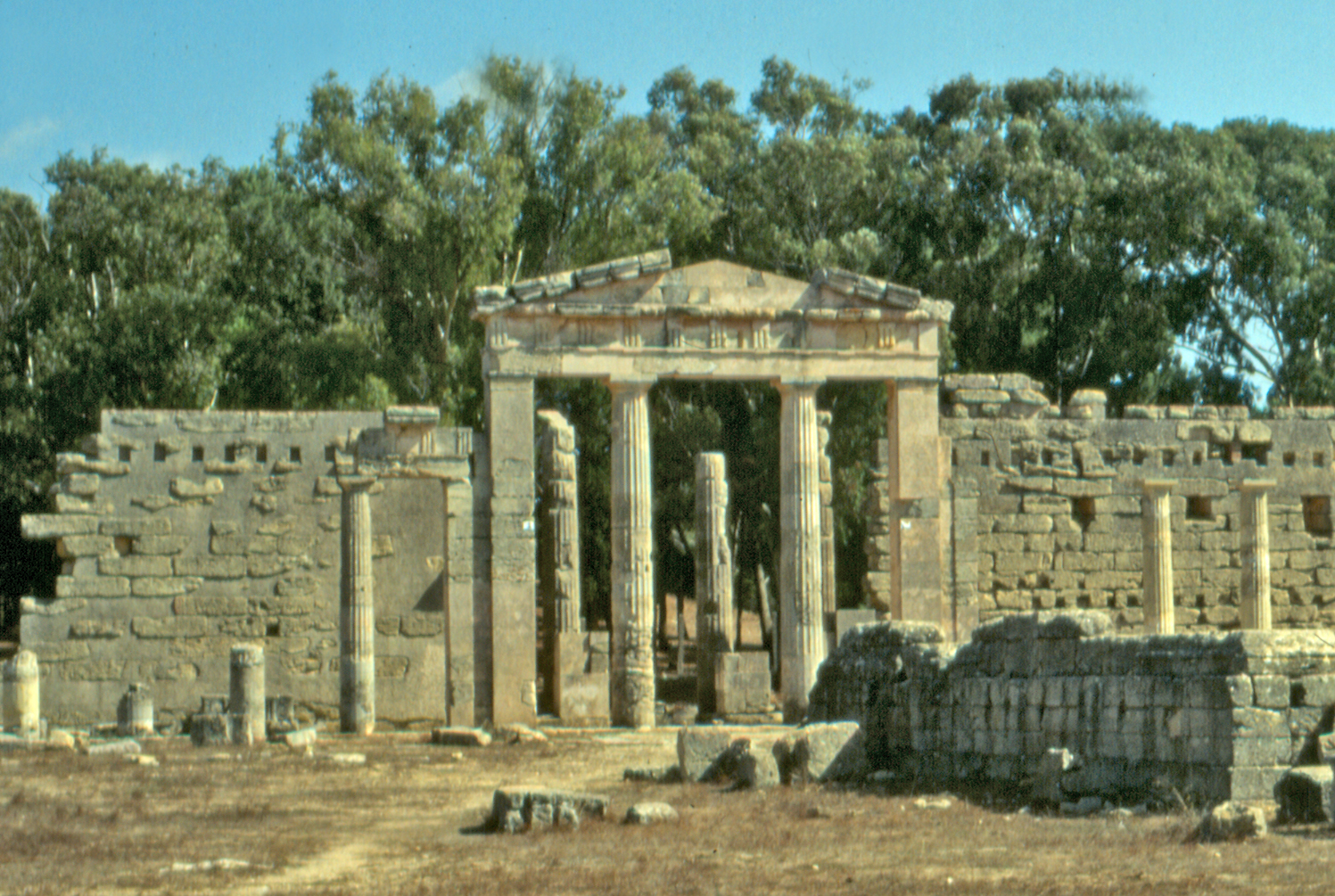 Libia, Cirene (sito archeologico), Ginnasio, propilei occidentali